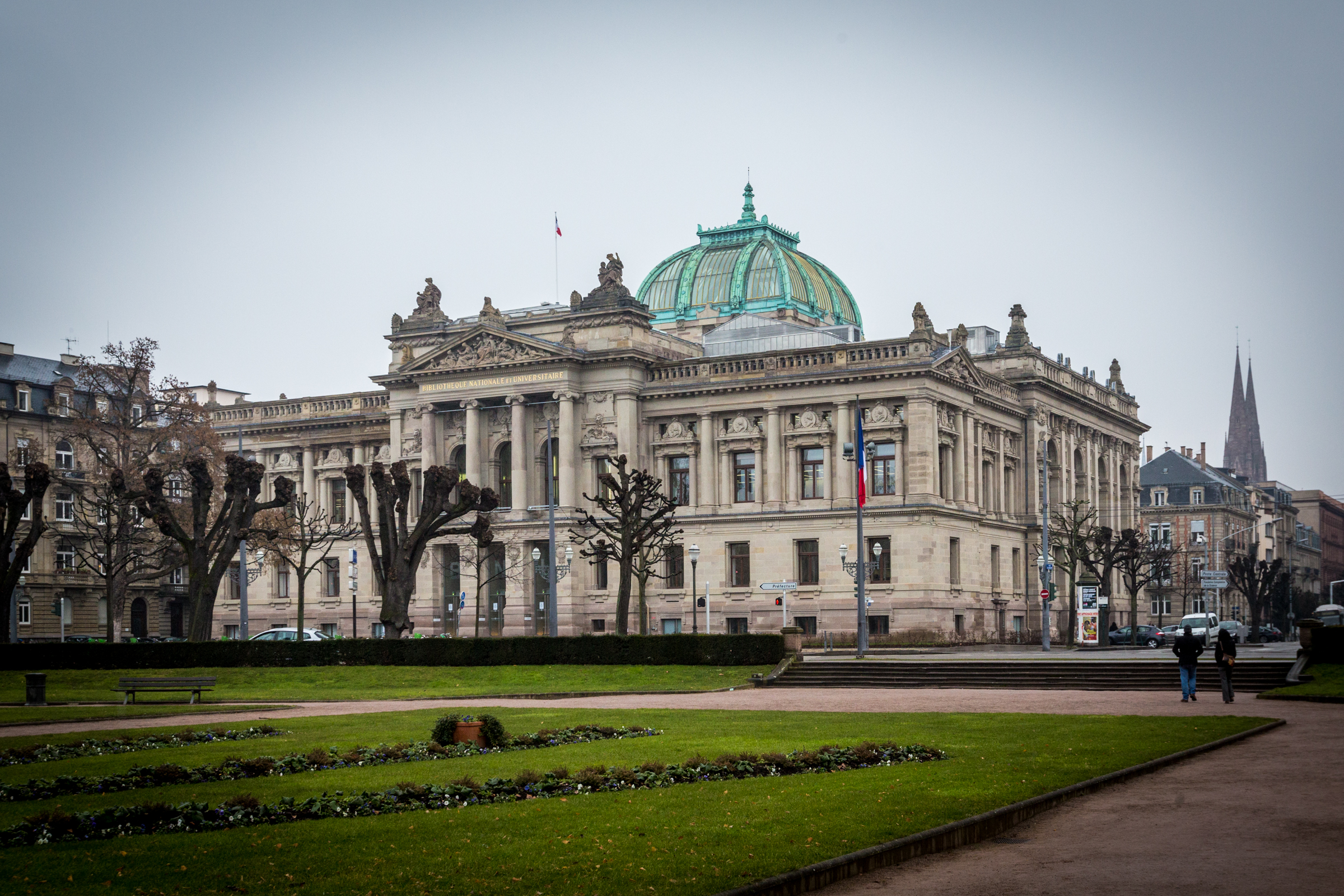 Strasbourg Bibliothèque nationale et universitaire